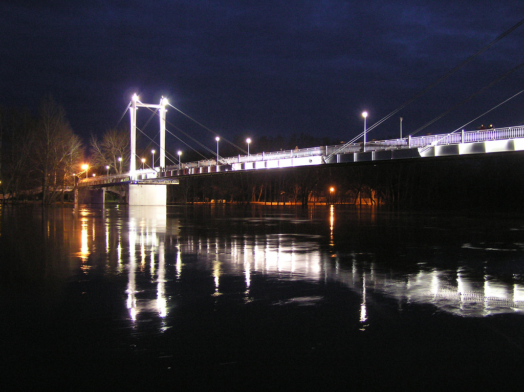 Мост в Оренбурге